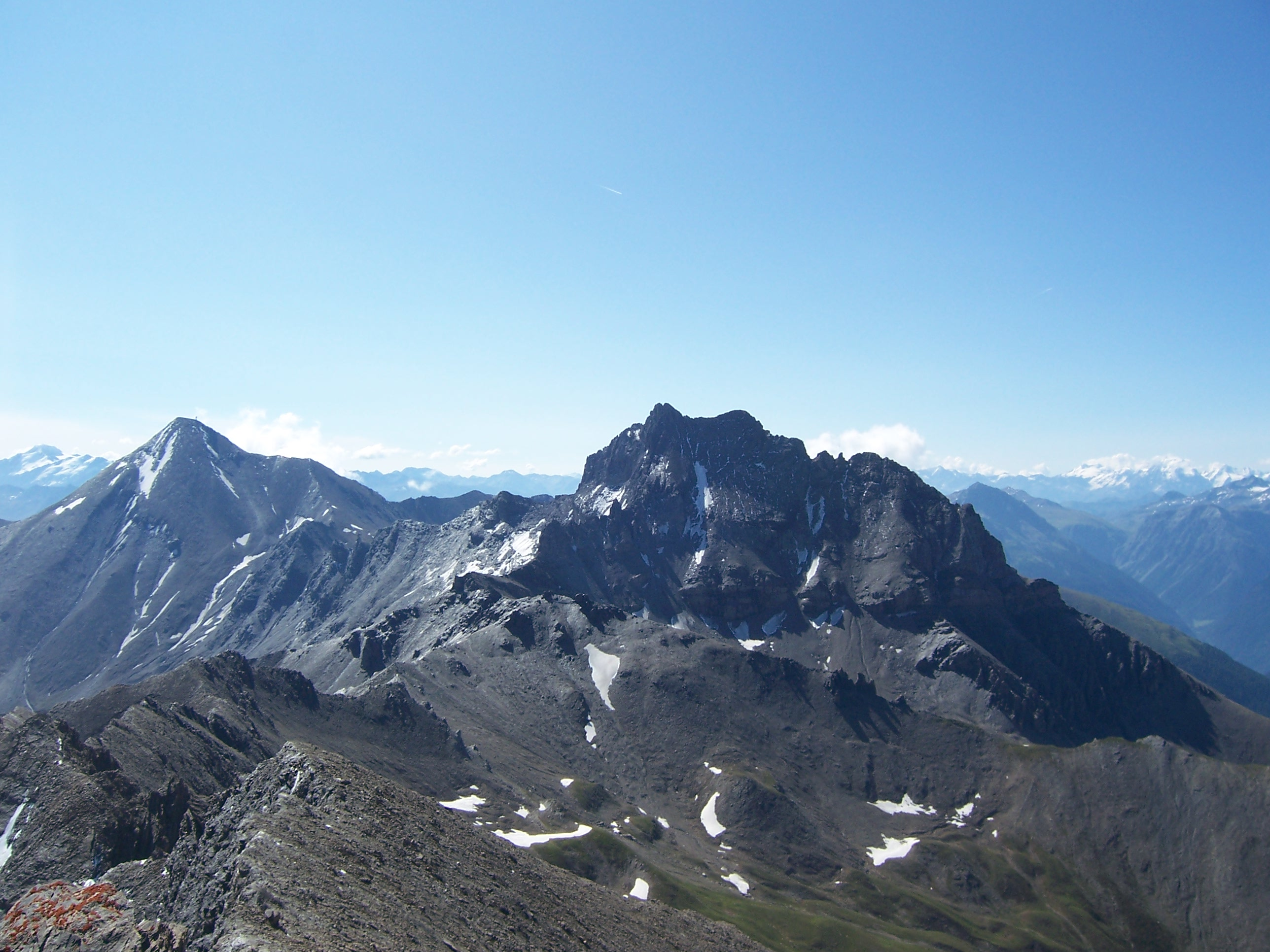 Muttler 3294 m.ü.M (links) mit Stammerspitze (Piz Tschütta) 3254 m.ü.M (rechts), fotografiert vom Piz Rots (Vesilspitze) 3097 m.ü.M